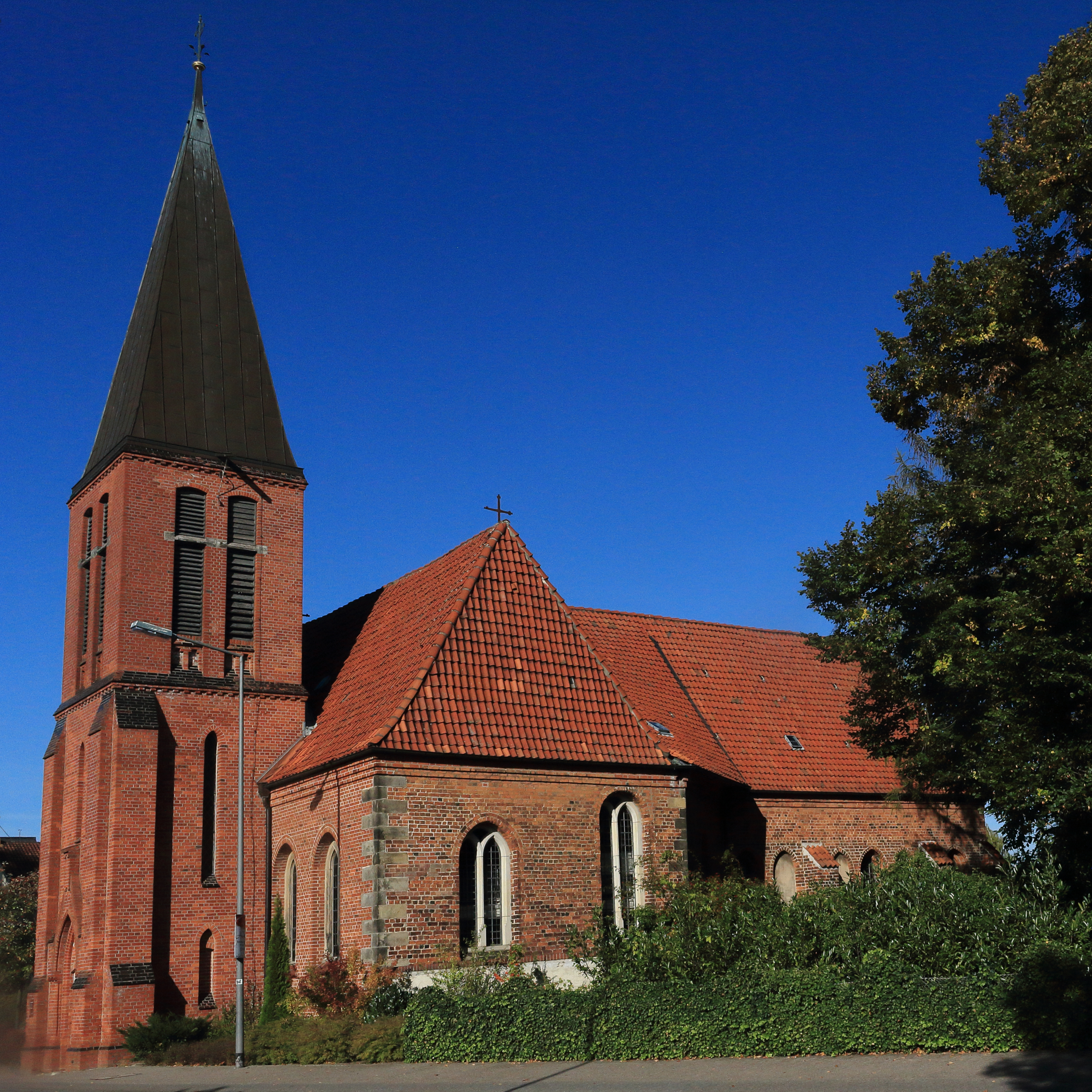 Sankt-Georg-Kirche, Celle, Braunschweiger Heerstraße 1